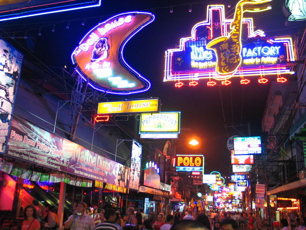 Pattaya at Night